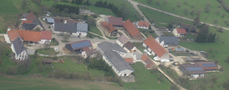 Aerial Photo of Aichen, Nellingen, Alb-Donau-Kreis, Baden-Württemberg, Germany